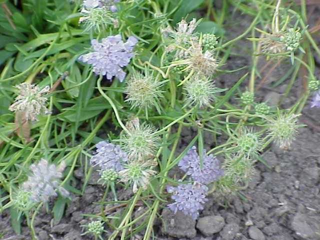 Species: Scabiosa vestina Family: Dipsacaceae Image No. 1